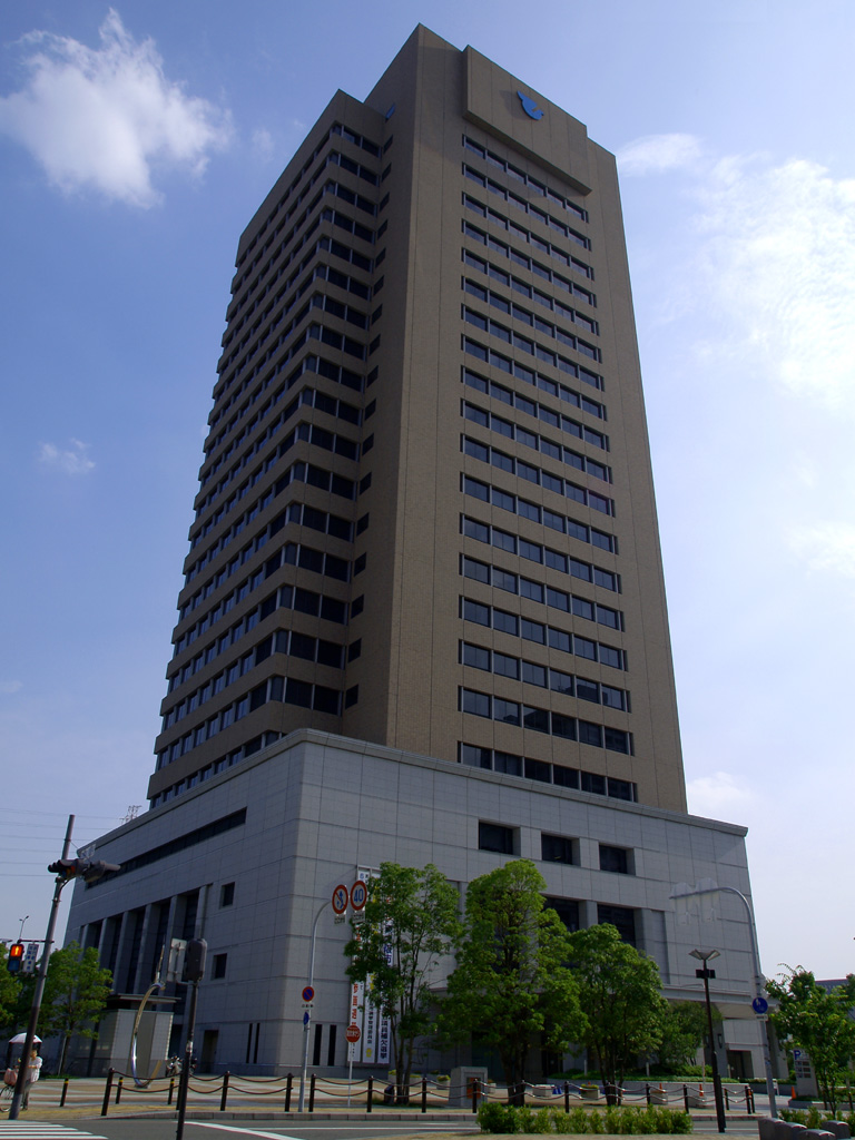 東大阪市役所 所在地：大阪府東大阪市荒本北50番地の4